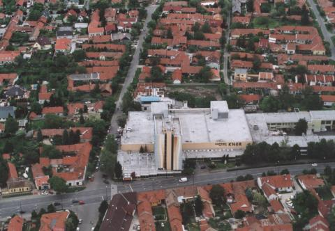 Békéscsaba- Hungary